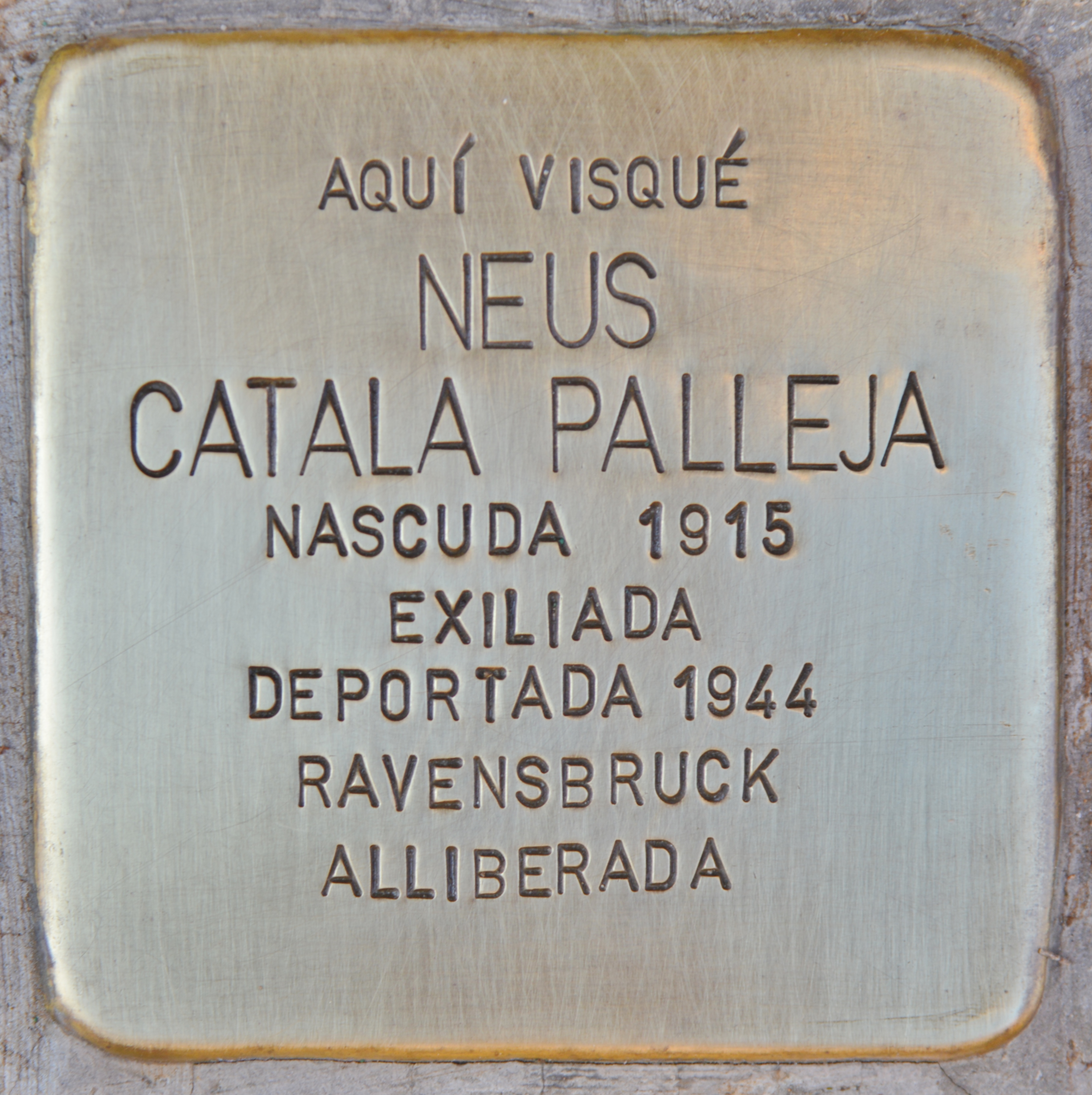 Stolperstein für Neus Catala Palleja